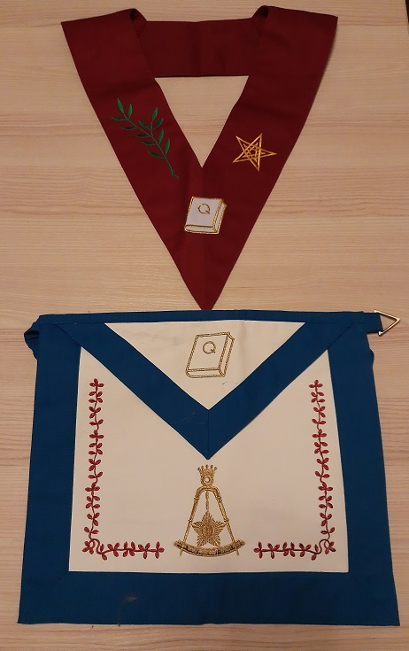 Perfect Elu 14°